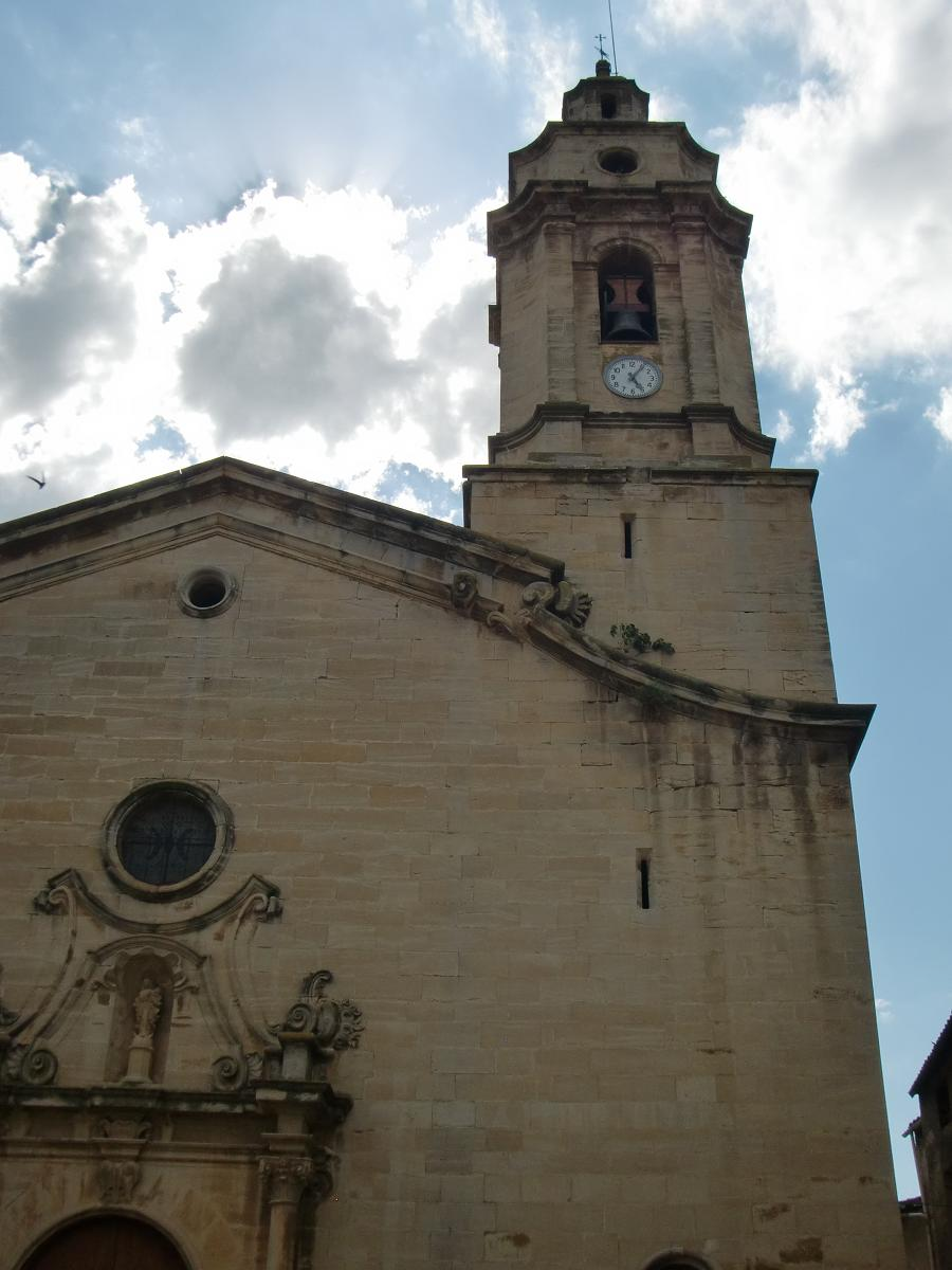 Esglèsia de la Immaculada Concepció del S.XVIII